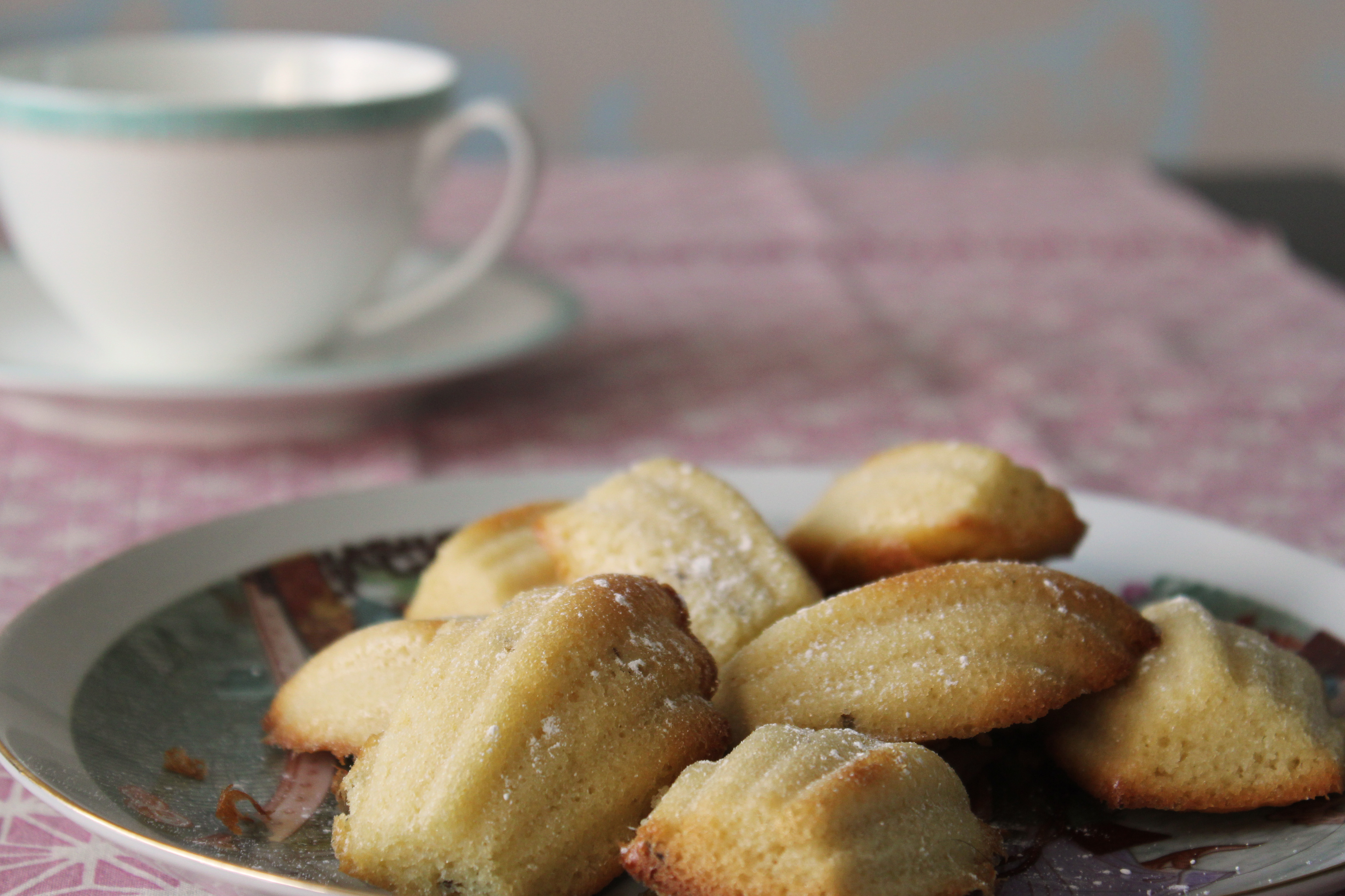 Madeleines au miel de lavande